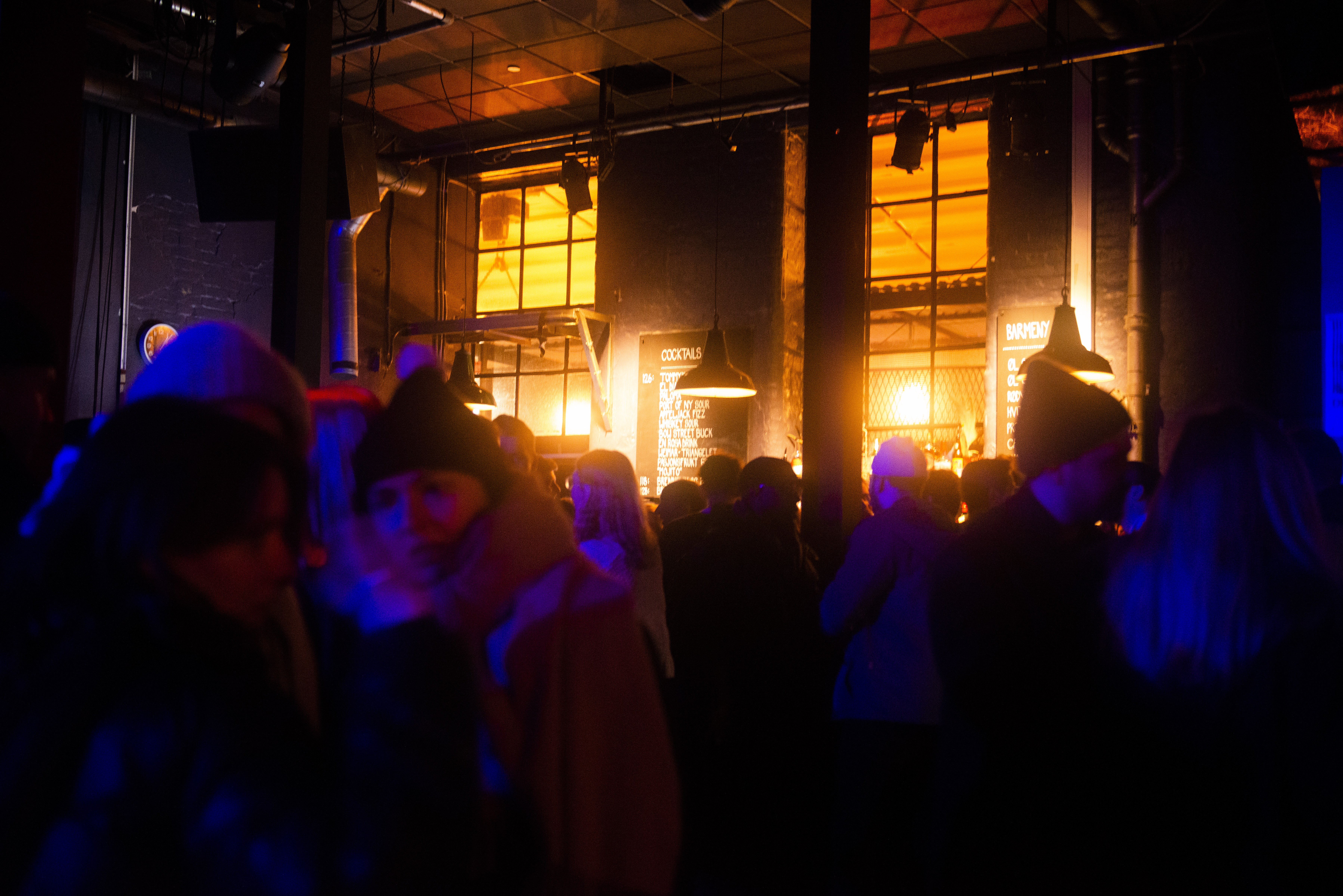 Inne på Blå. Foto av Marthe Thu.